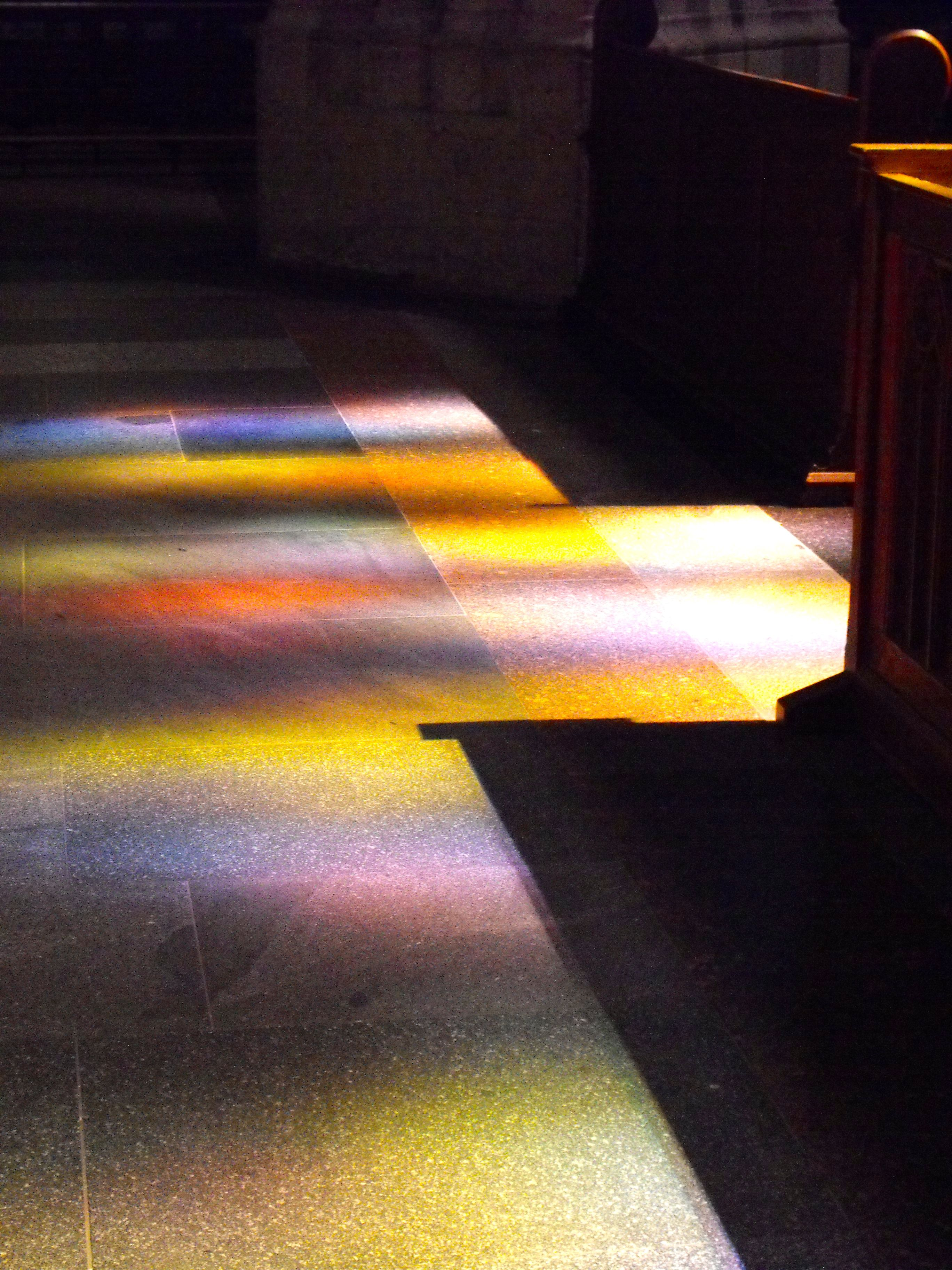 Kölner Dom, Domkloster 4; Lichtspiel des Kirchenfensters von Gerhard Richter im Inneren des DomesThis is a photograph of an architectural monument.